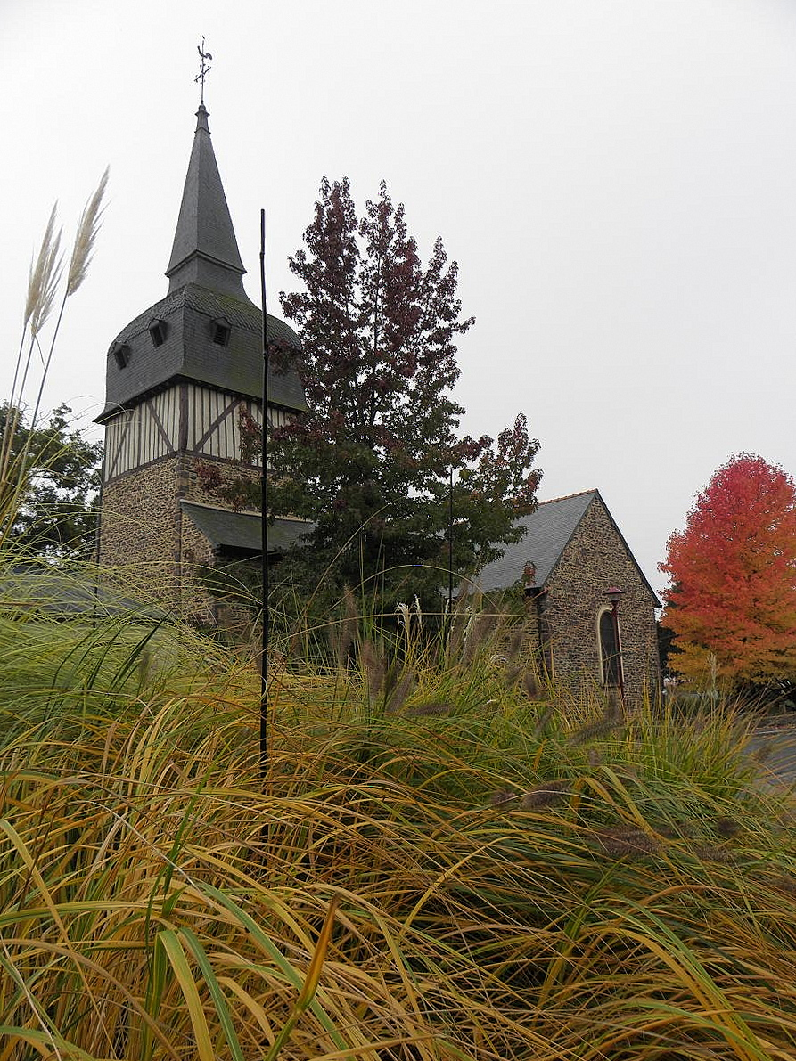 Église Notre-Dame-de-Montual à La Chapelle-Thouarault (35).